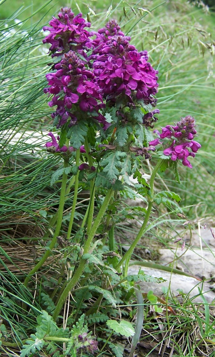 Pedicularis verticillata (pl. gnidosz okółkowy), habitat: Tatra Mountains, Dolina Miętusia